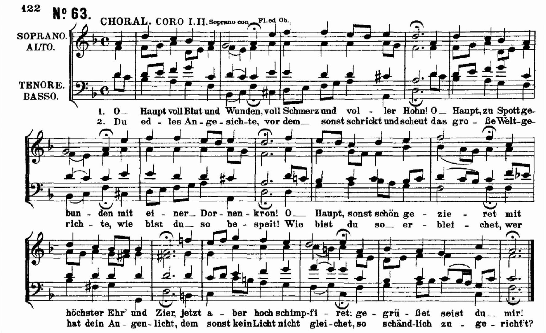 Johann Sebastian Bach: O Haupt voll Blut und Wunden, vierstimmiger Chorsatz aus der Matthäuspassion